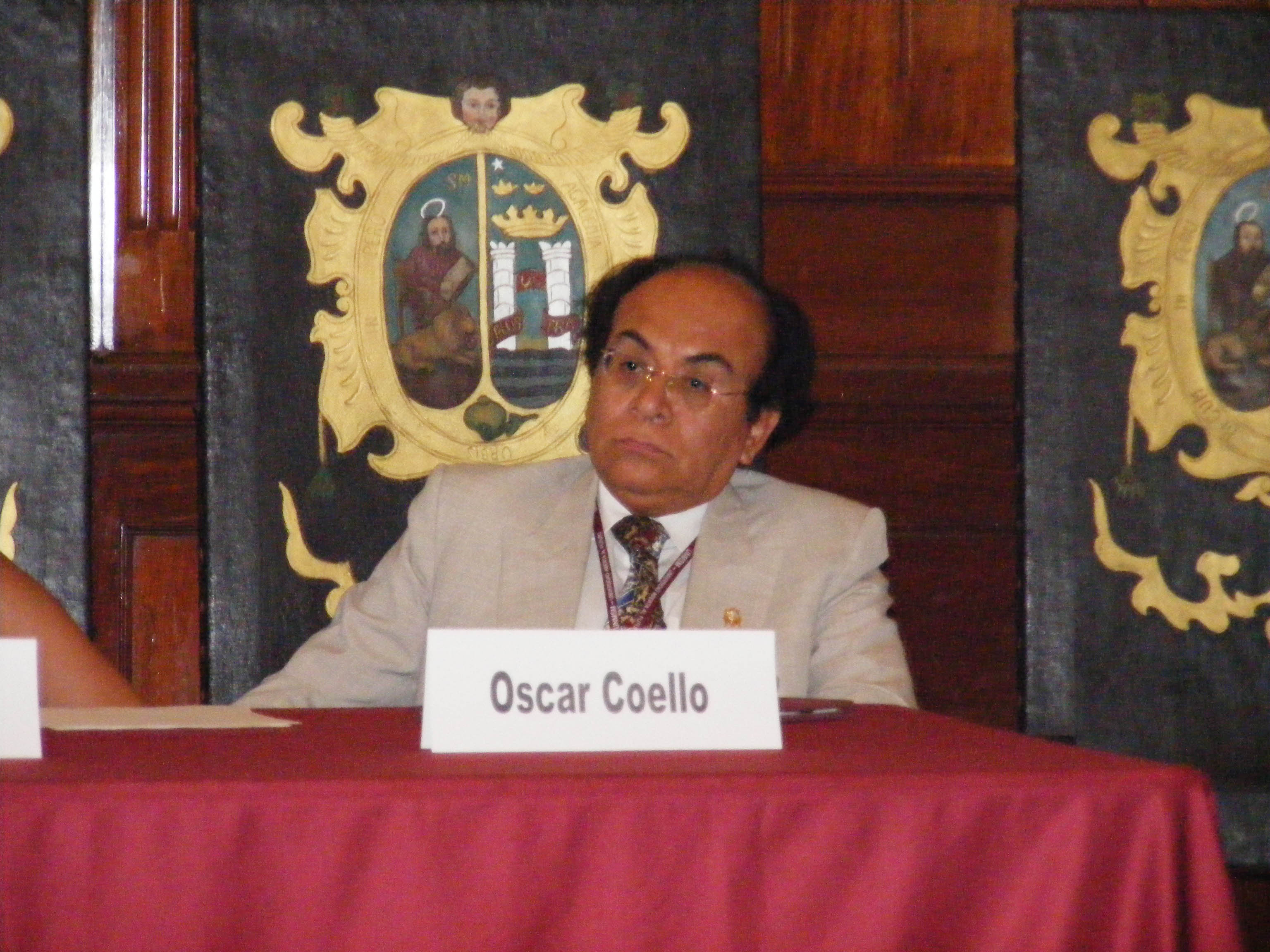 Dr. Oscar Coello en el XVI Coloquio de Historia de Lima(2009) en la Casona de San Marcos